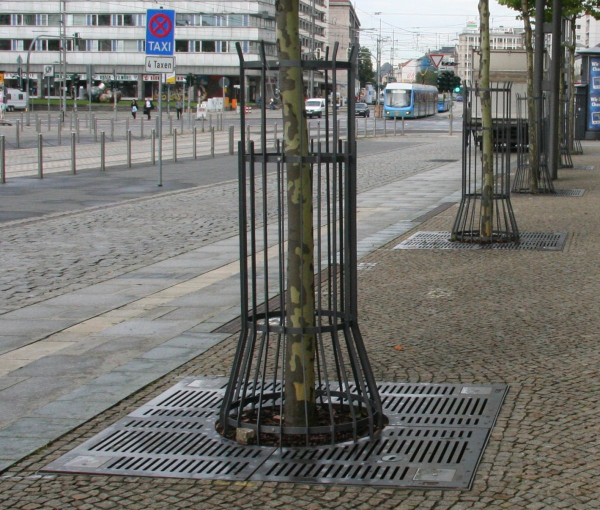 befahrbare Baumscheibenabdeckung mit Stammschutzgitter in Chemnitz